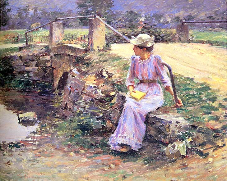 La débacle